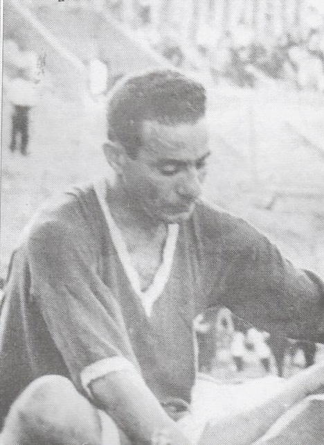 أول هداف للدوري المصري الممتاز